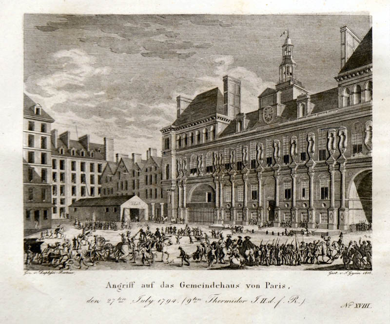 Angriff auf das Pariser Rathaus am 9. Thermidor 1794, Radierung von Samuel Gysin nach einer Zeichnung von Jean Duplessis-Bertaux